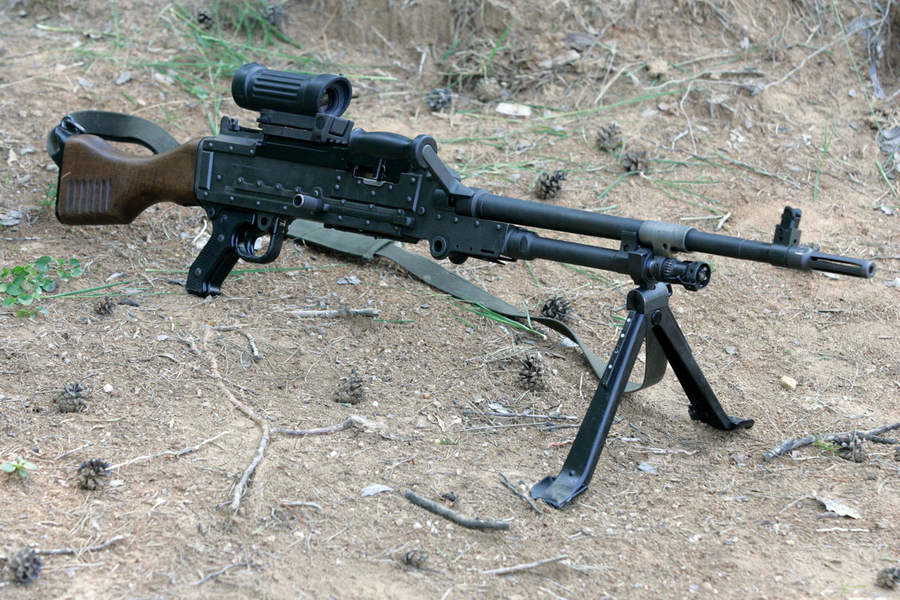 Mitraljez FN MAG Slovenske vojske z optiko C79.